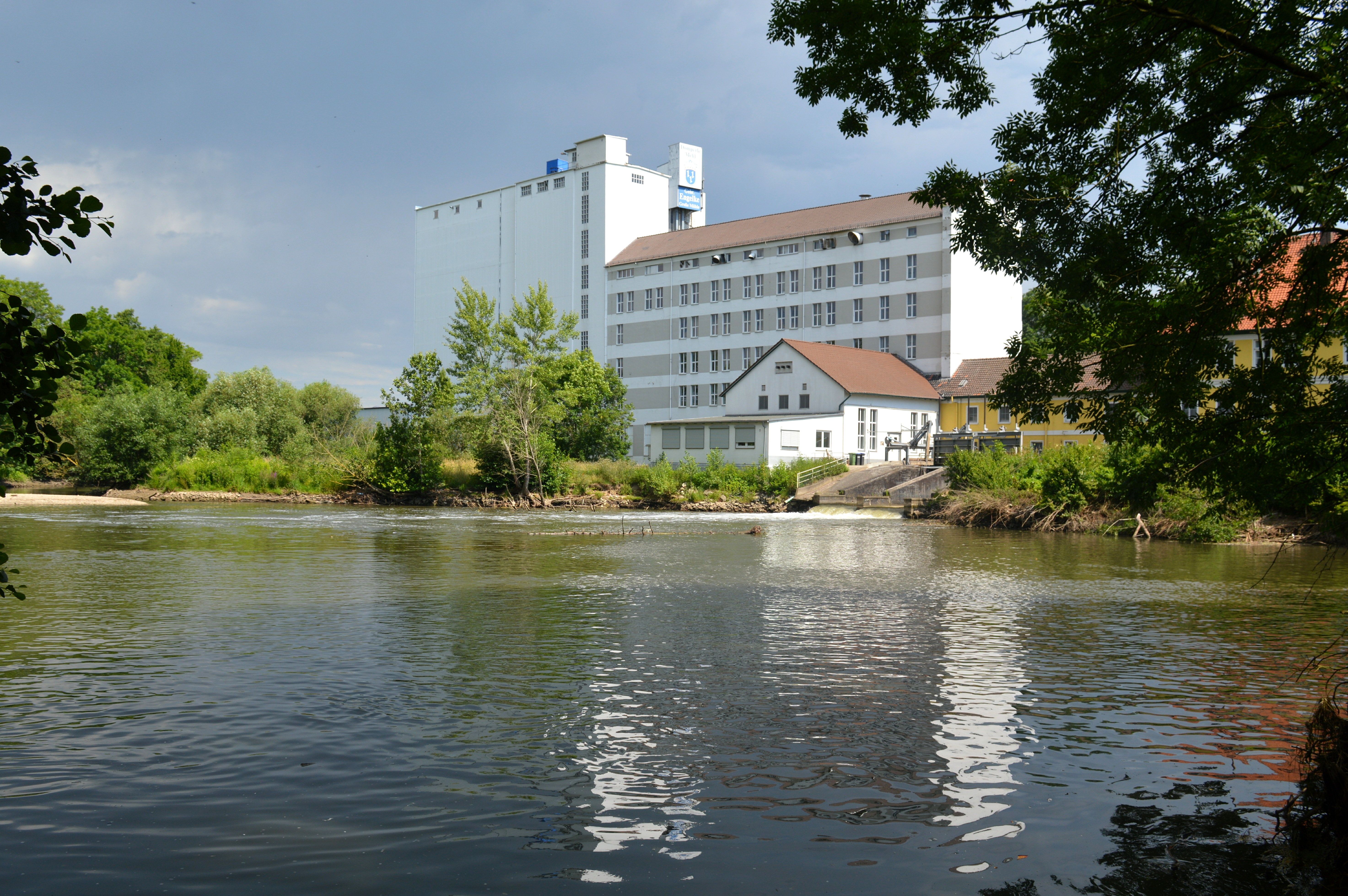 Blick aus dem NSG Haseder Busch (Standort Gebietsrand, Gewässer nicht im NSG) in nördliche Richtung zur Mühle (Gebr. Engelke Große Mühle) in Giesen-Hasede